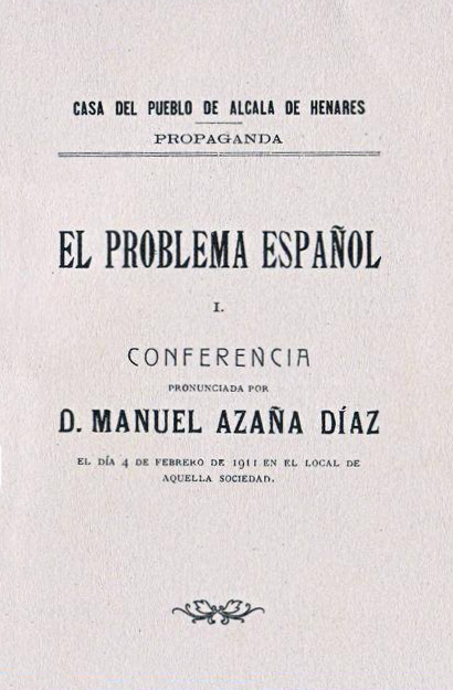 Conferencia de Manuel Azaña, titulada "El problema español". Pronunciada en la Casa del Pueblo de Alcalá de Henares (Comunidad de Madrid - España) el 4 de febrero de 1911.